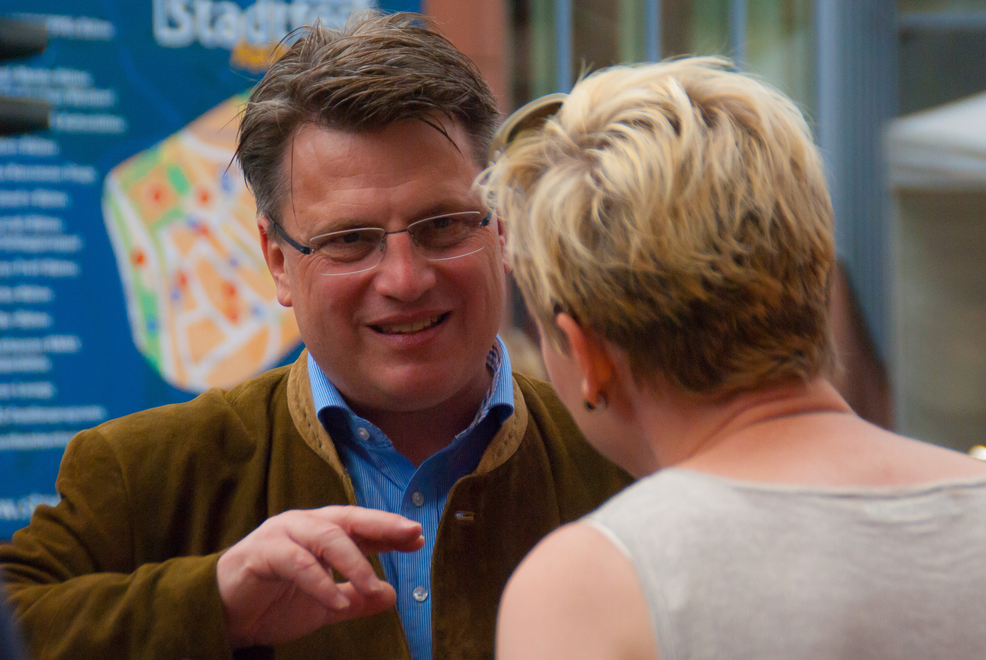 Das Bild entstand auf dem Stadtfest in Aschaffenburg im Gespräch mit einer Bürgerin.